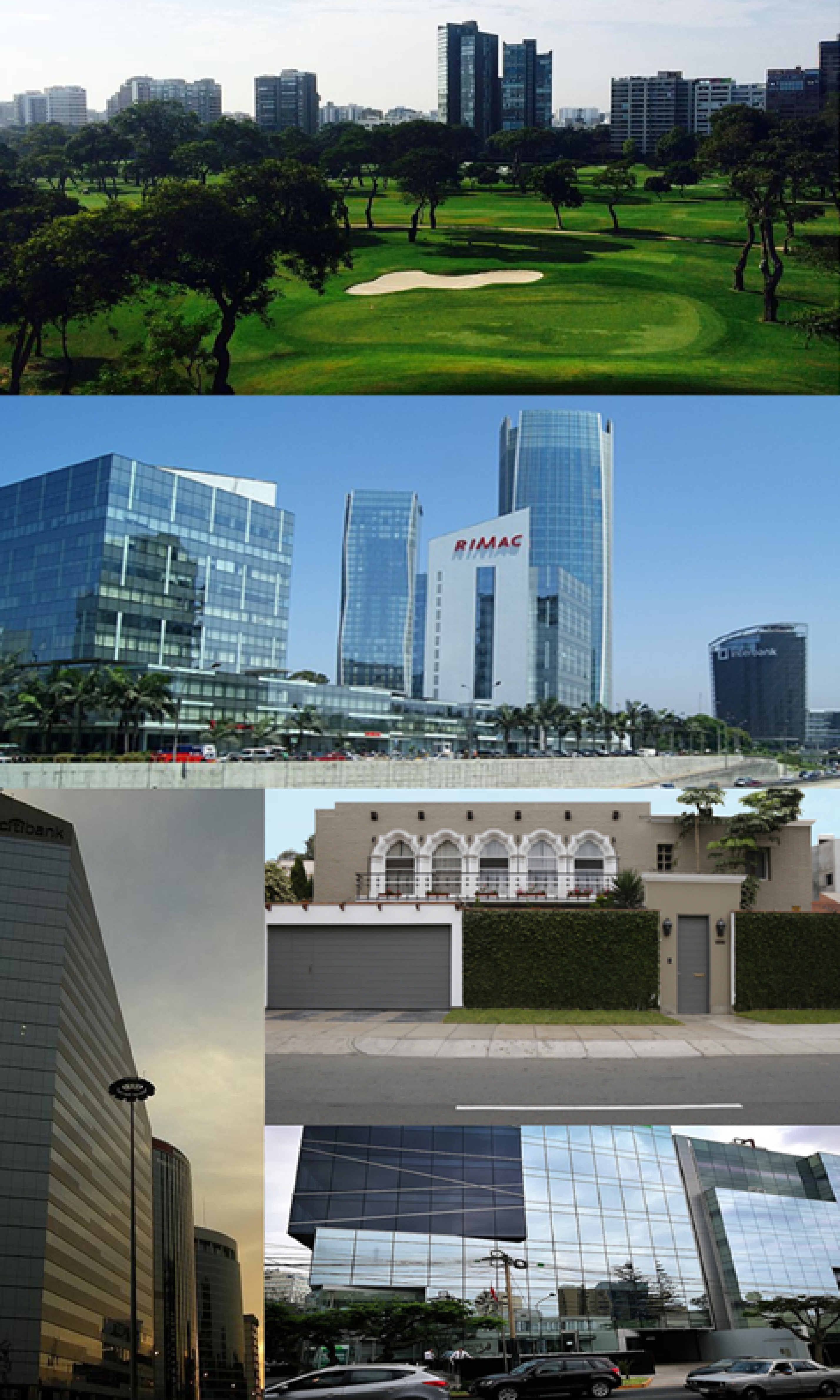 Lima, Perú